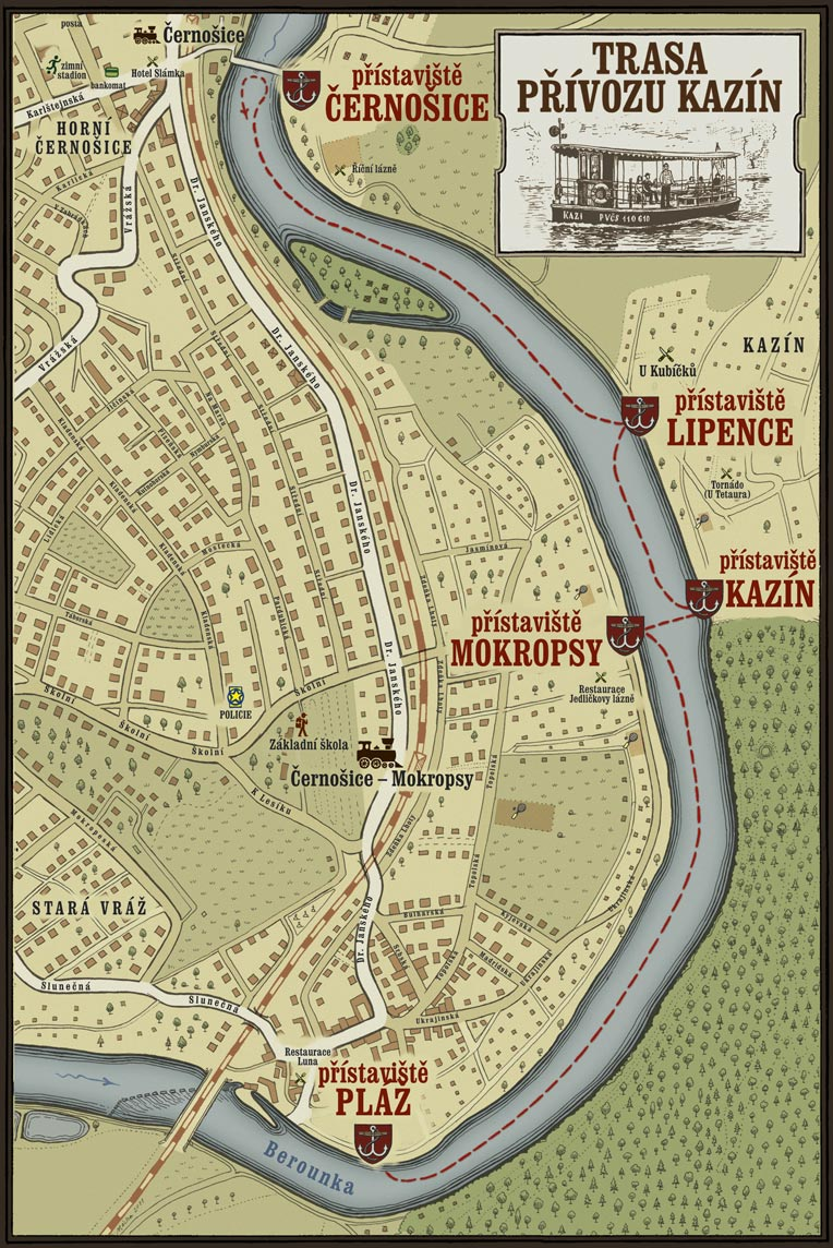 Mapa trasy vyhlídkové plavby v Černošicích